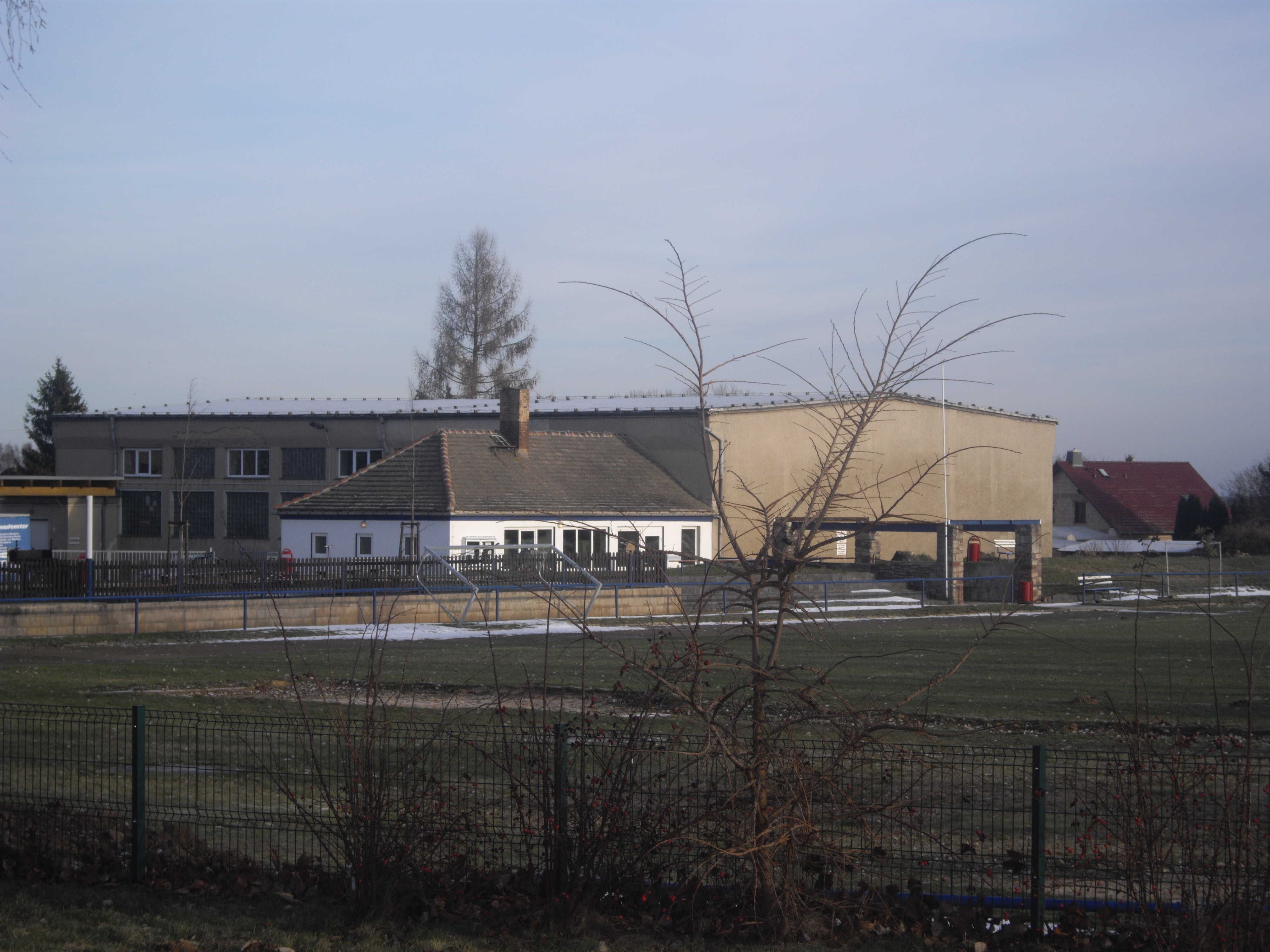 Die Sporthalle von Siersleben, das weiße Häuschen davor sind die Umkleideräume.